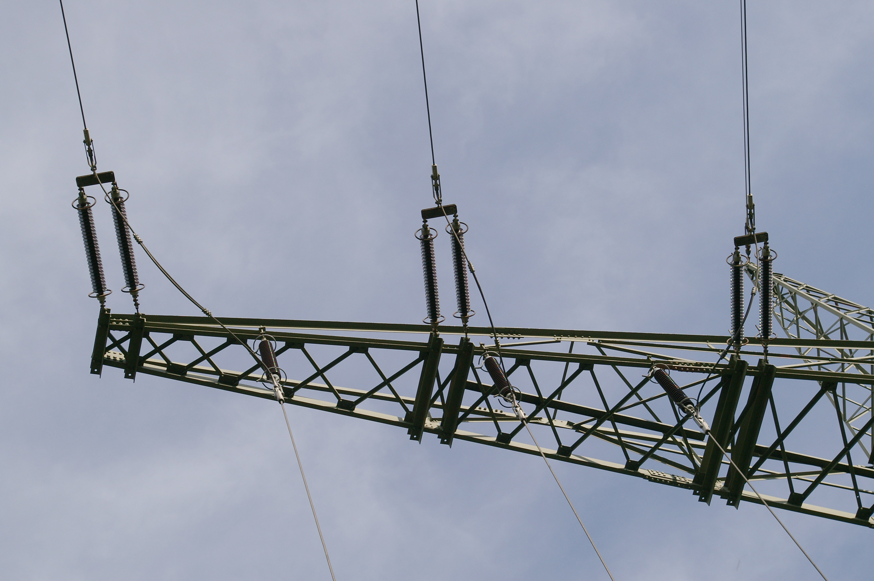 Leitungsführung und Isolatoren an der Traverse eines Abspannmasts (110 kV, Endmast an der Umspannstation Alter Hellweg in Unna)